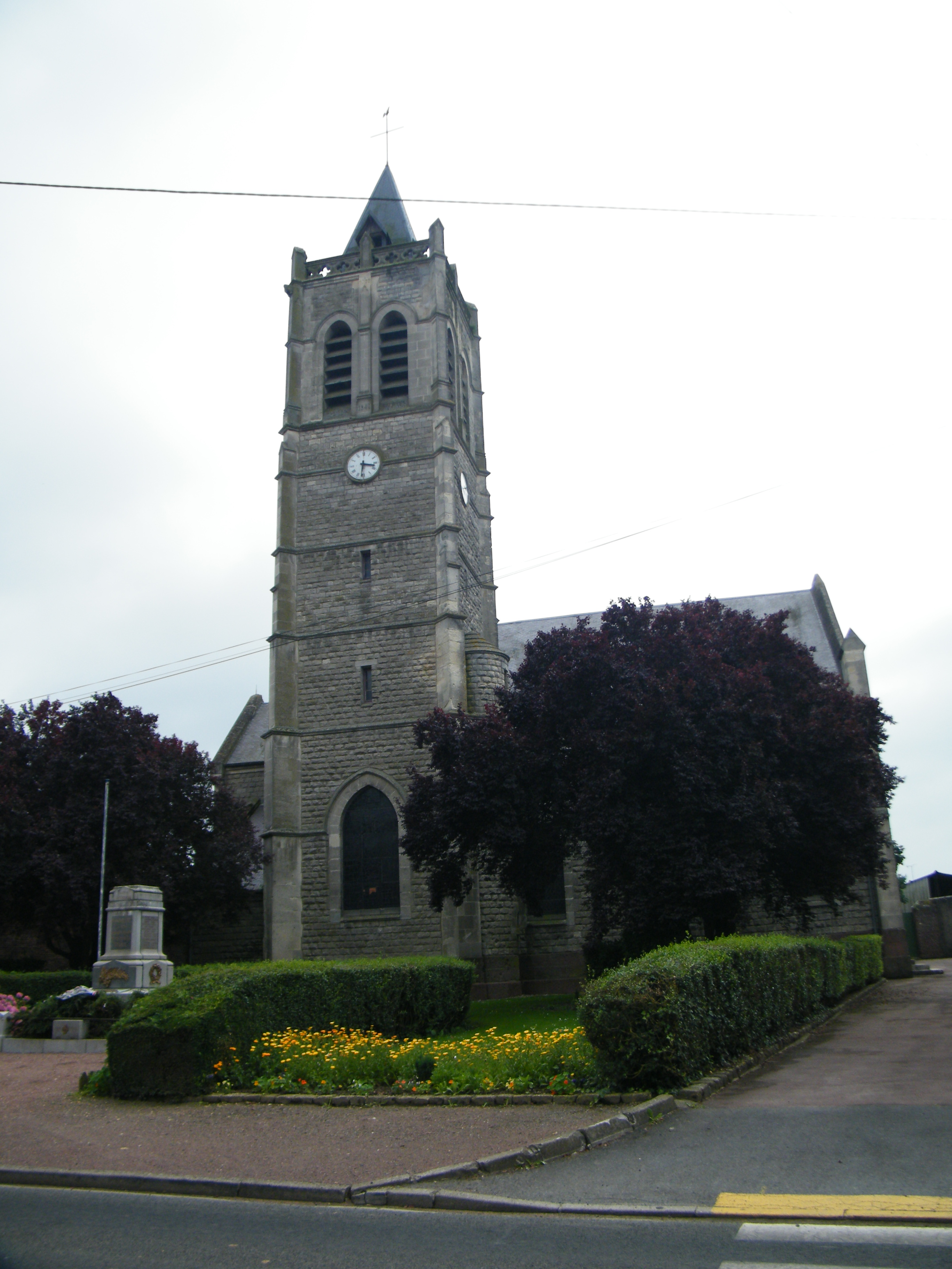 église